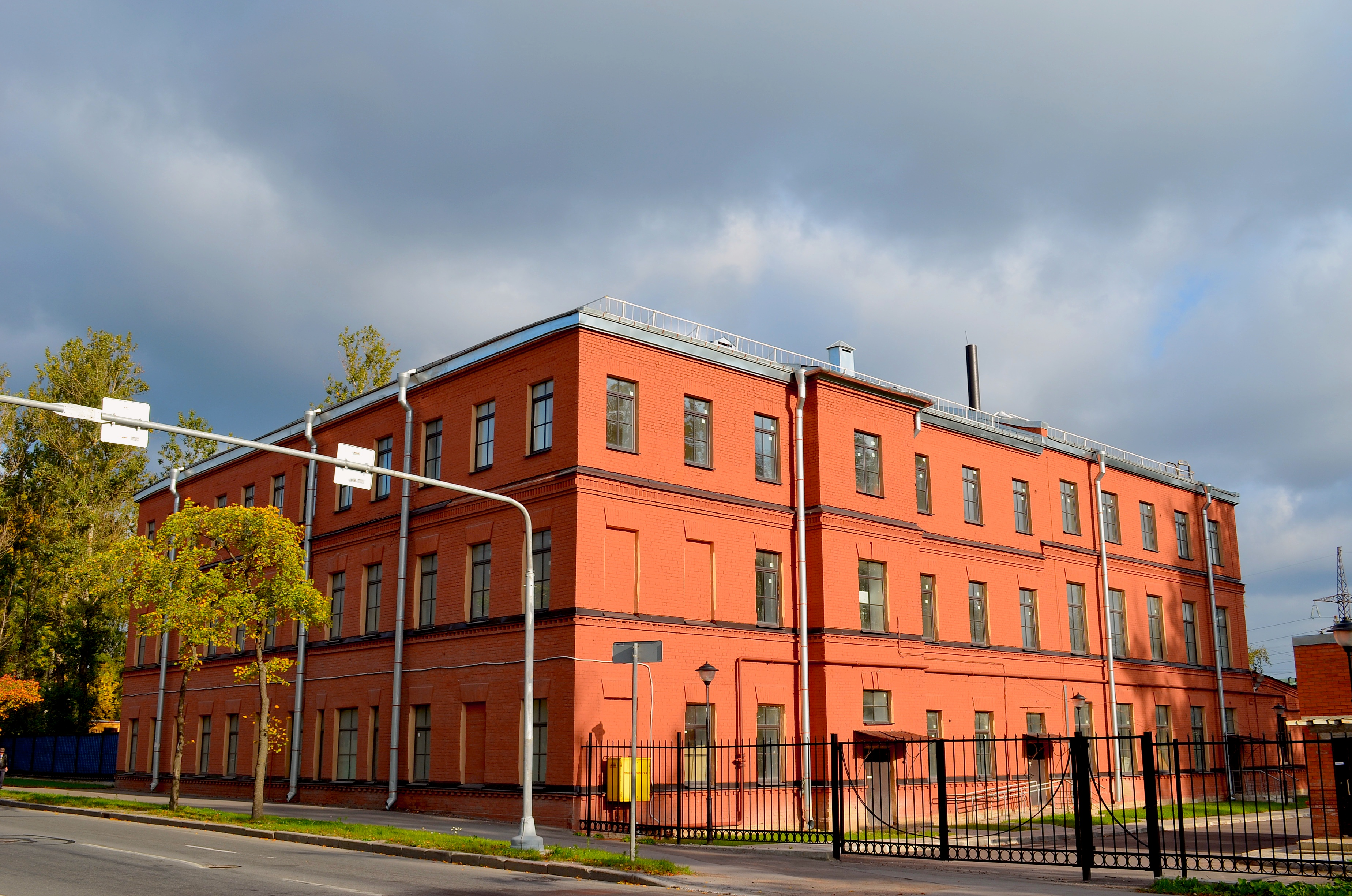 Пороховская ремесленная школа: улица Красина, 4, Красногвардейский район, Санкт-Петербург